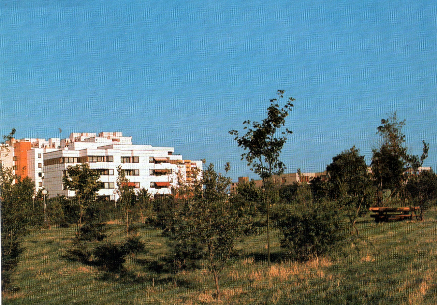 Lichtenrader Volkspark in Lichtenrade, Berlin Sommer 1983